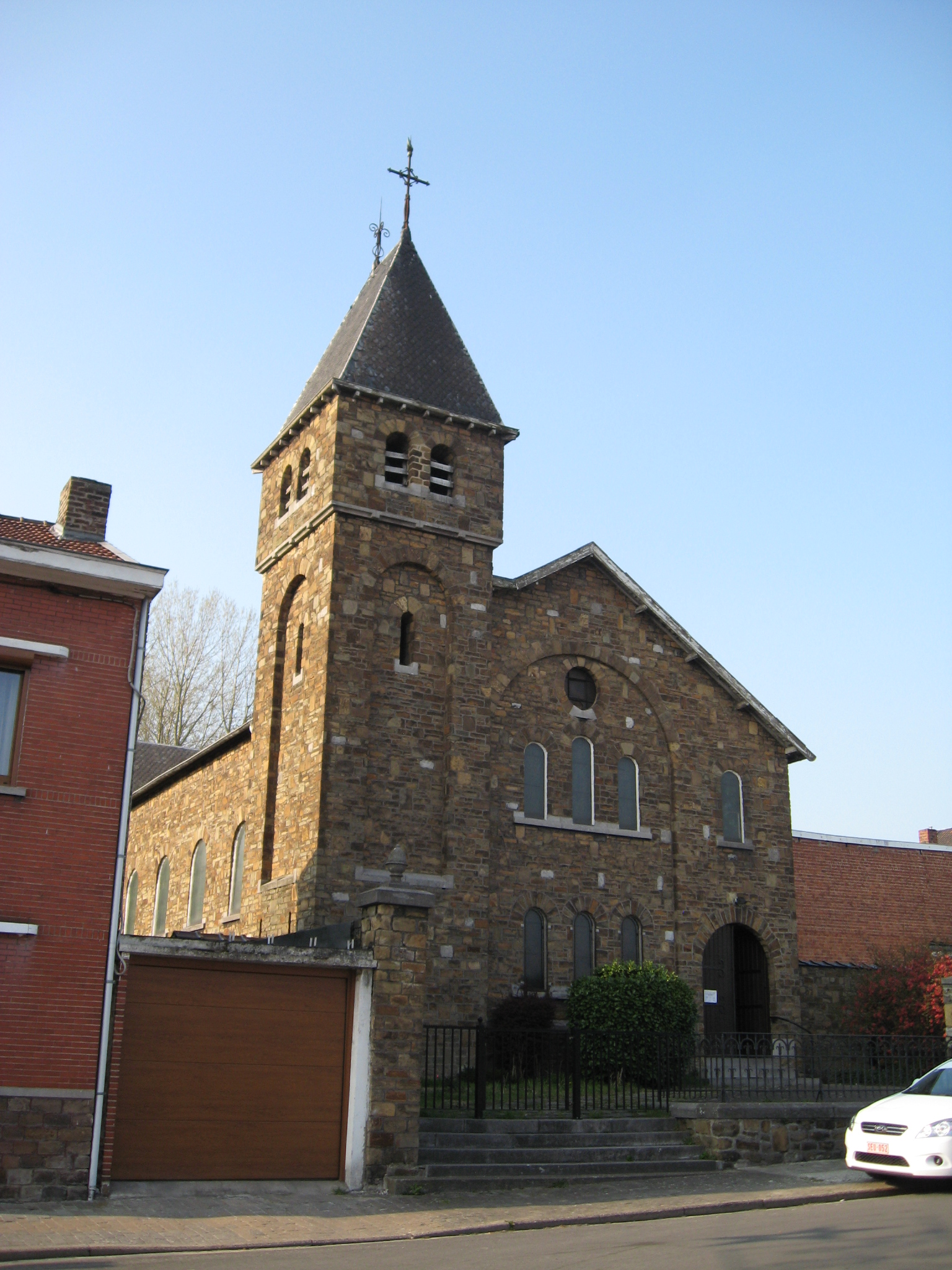 Sint-Jozefkerk te Lamay, Montegnée, Saint-Nicolas